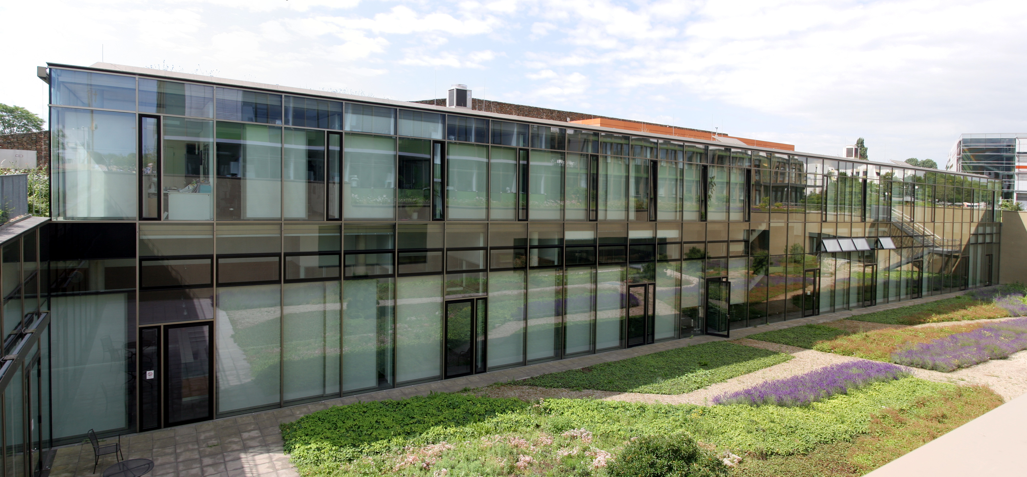 Das Heidelberger Ionenstrahl-Therapiezentrum von Außen